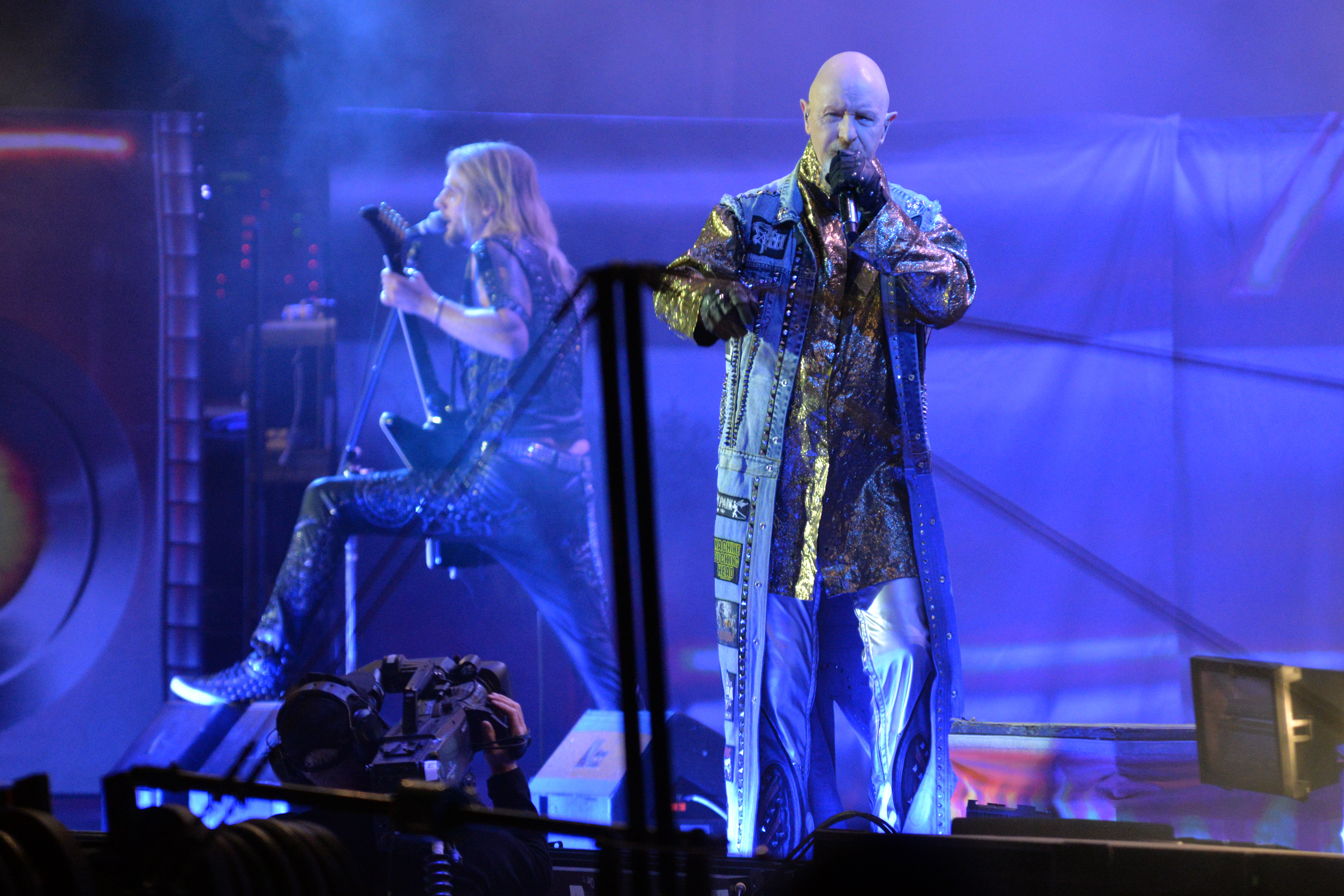 Le groupe anglais Judas Priest sur la Main Stage I du Hellfest 2018, Clisson, Loire-Atlantique.